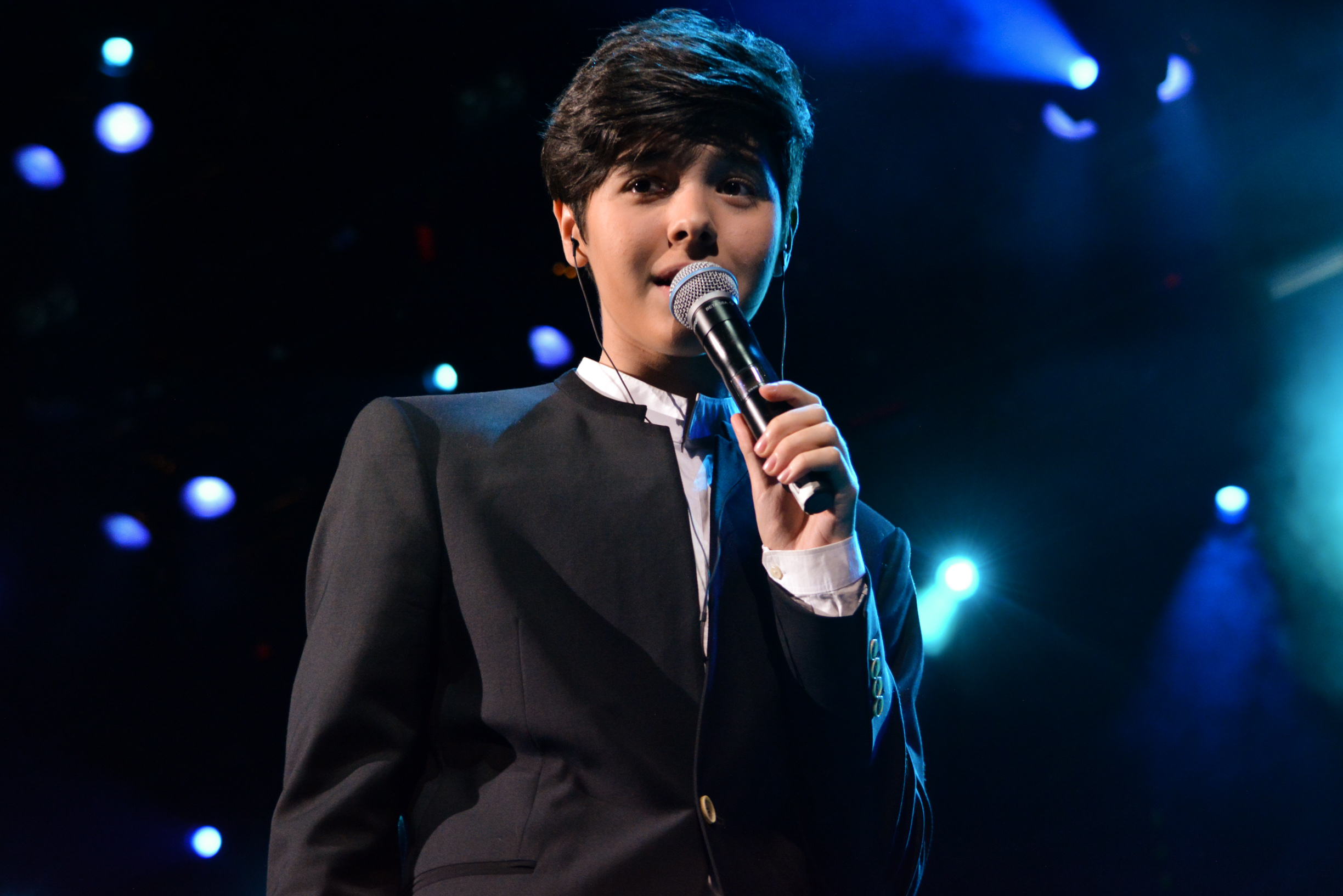 Кристиан Костов на концерте «Super Голос. Дети», 11 апреля 2015